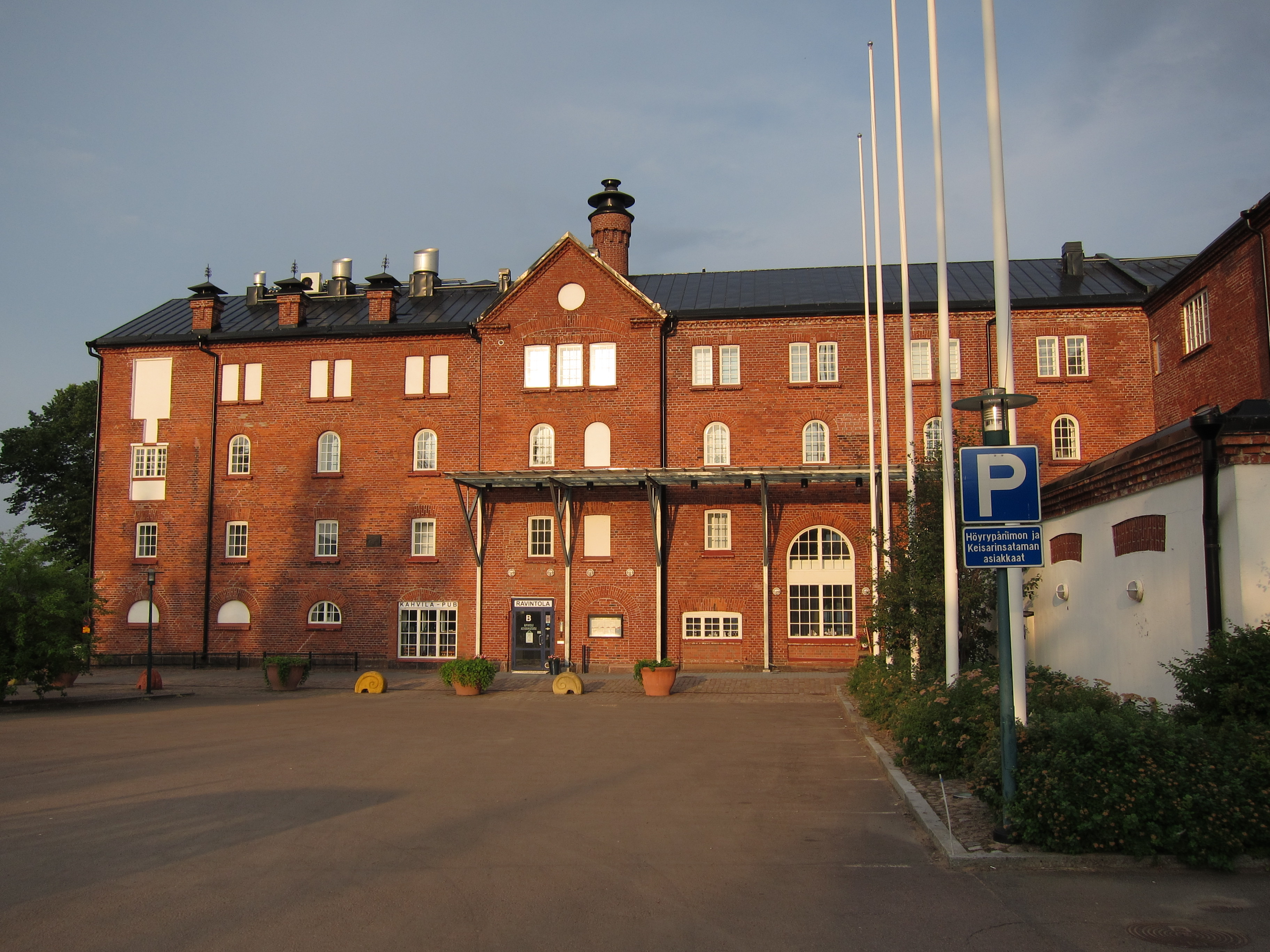 Kotkan Höyrypanimon rakennus.